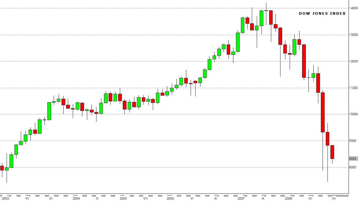 ukázka svícového grafu